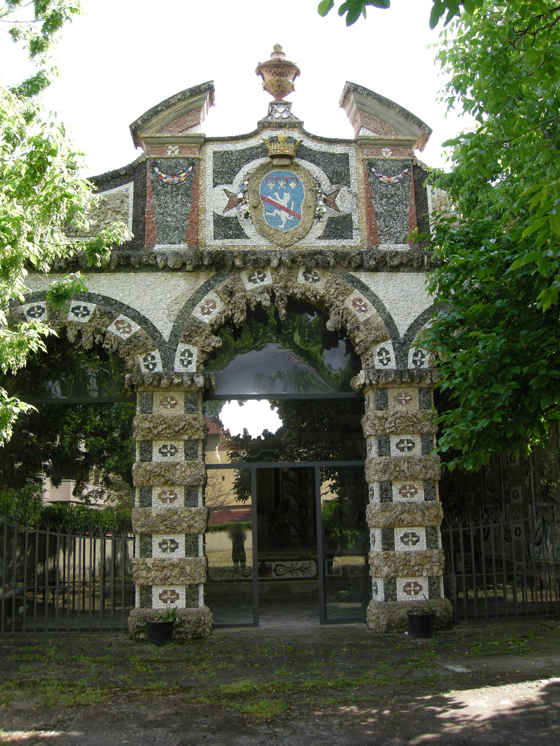 Ninfeo niccolini